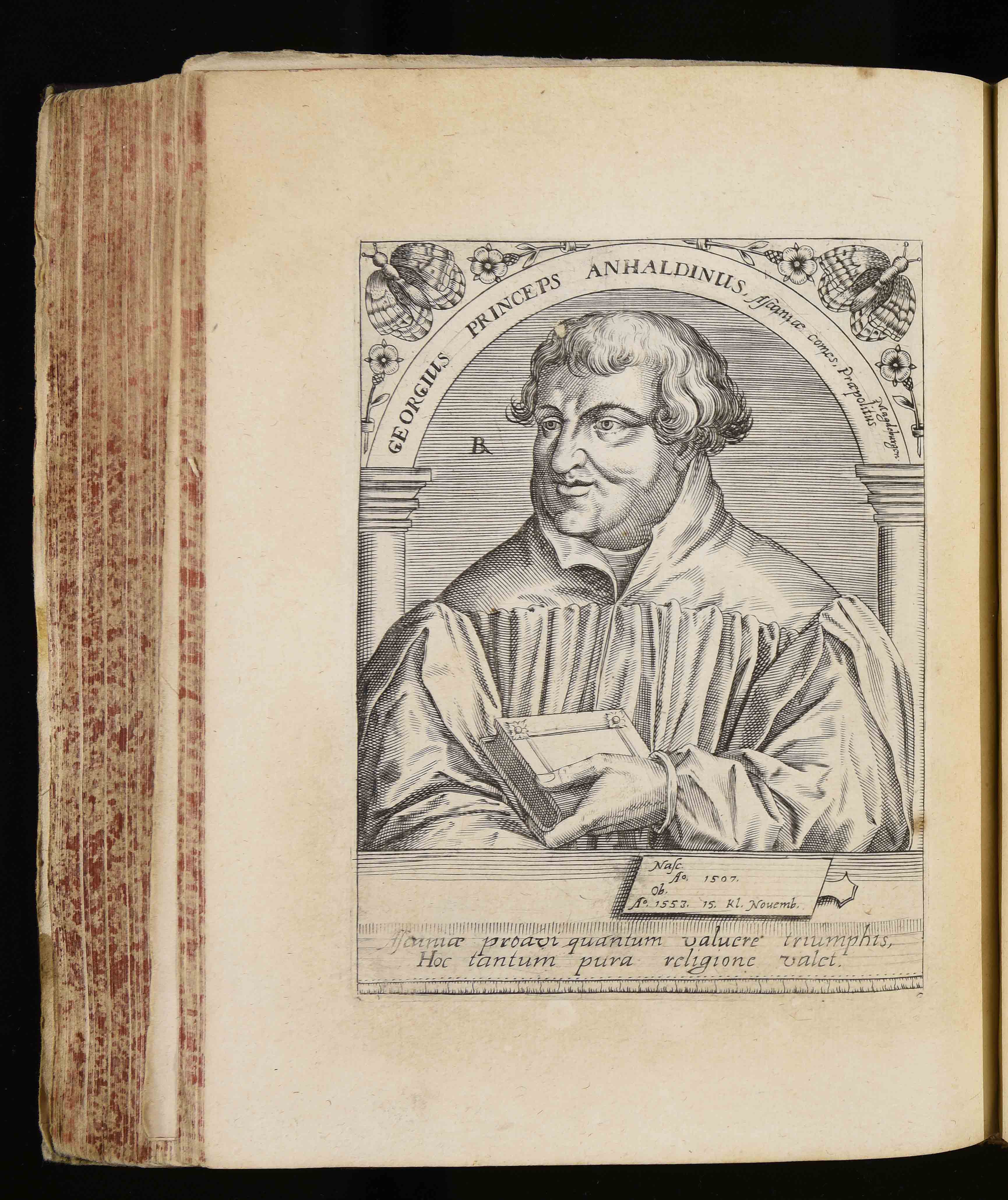 Calcografia in Jean Jacques Boissard, Bibliotheca sive Thesaurus virtutis, Frankfurt am Mein: William Fitzer 1627. Esemplare GI 1 v. c 41 della Biblioteca comunale di Trento, che presenta aggiunte successive.